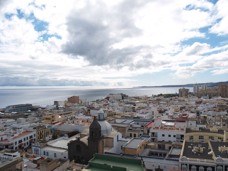 Vegueta y Cono Sur (vista parcial), desde la torre sur de la Catedral de Canarias. Las Palmas de Gran Canaria. Islas Canarias (España).